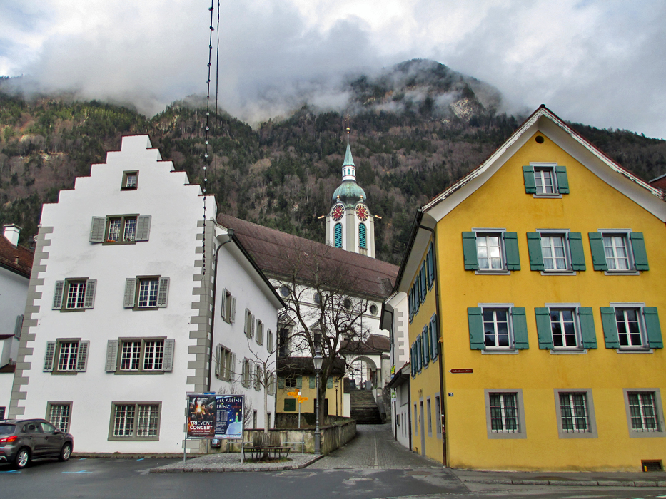 Altdorf UR, Kirchenviertel